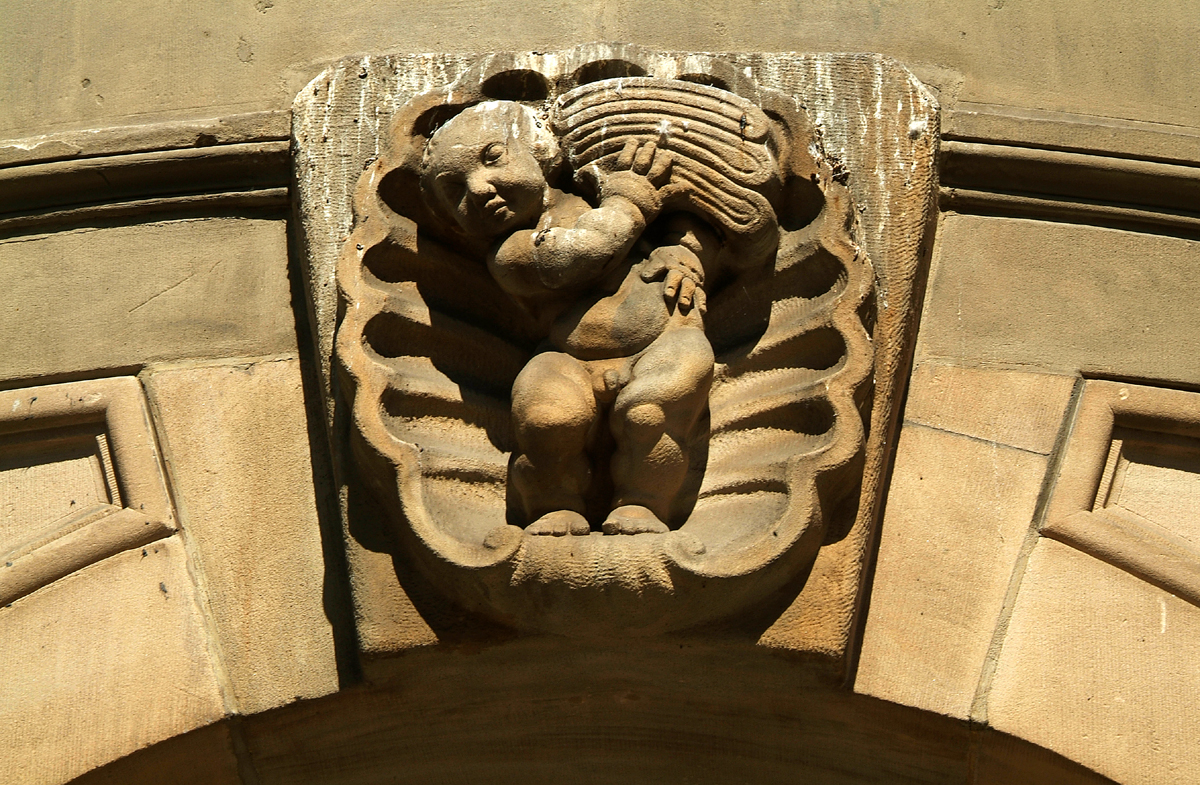 Detail an dem Kaufhaus in der Großen Packhofstraße/Ecke Osterstraße in Hannover